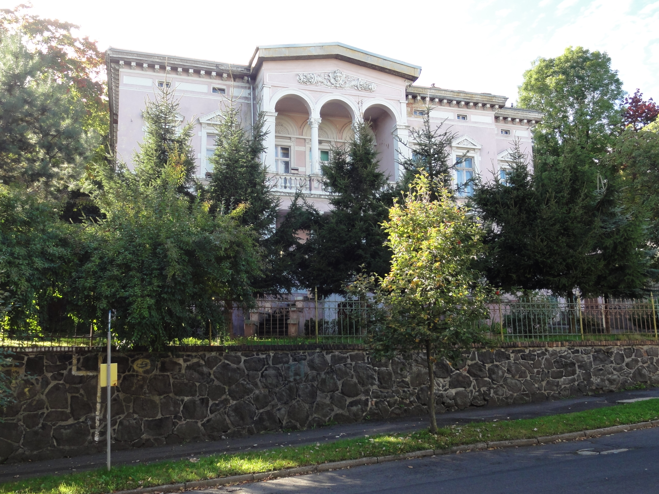 Lubań, ul. Górna 1 - willa, obecnie szkoła, XIX/XX w. (zabytek nr 614/959/J)